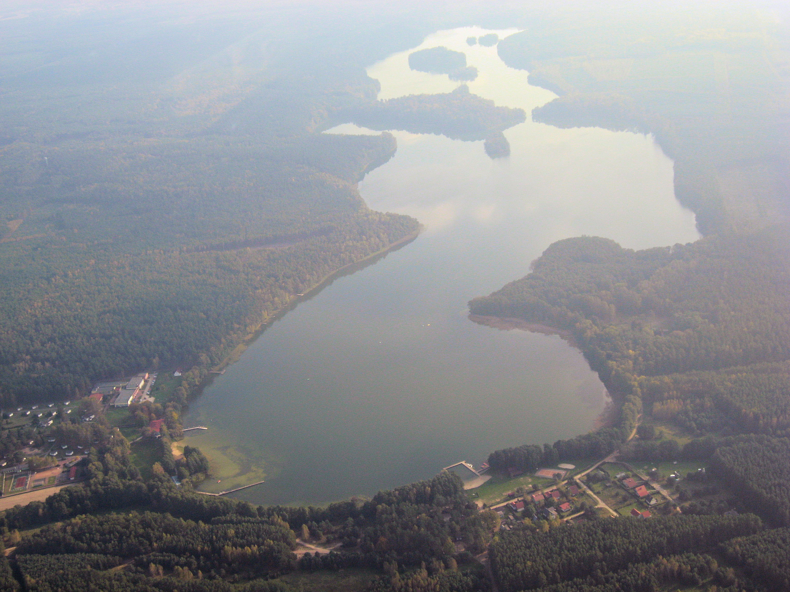 Jeziora Solecko i Lubiatówko, Gościm, gm. Drezdenko, woj. lubuskie, Poland